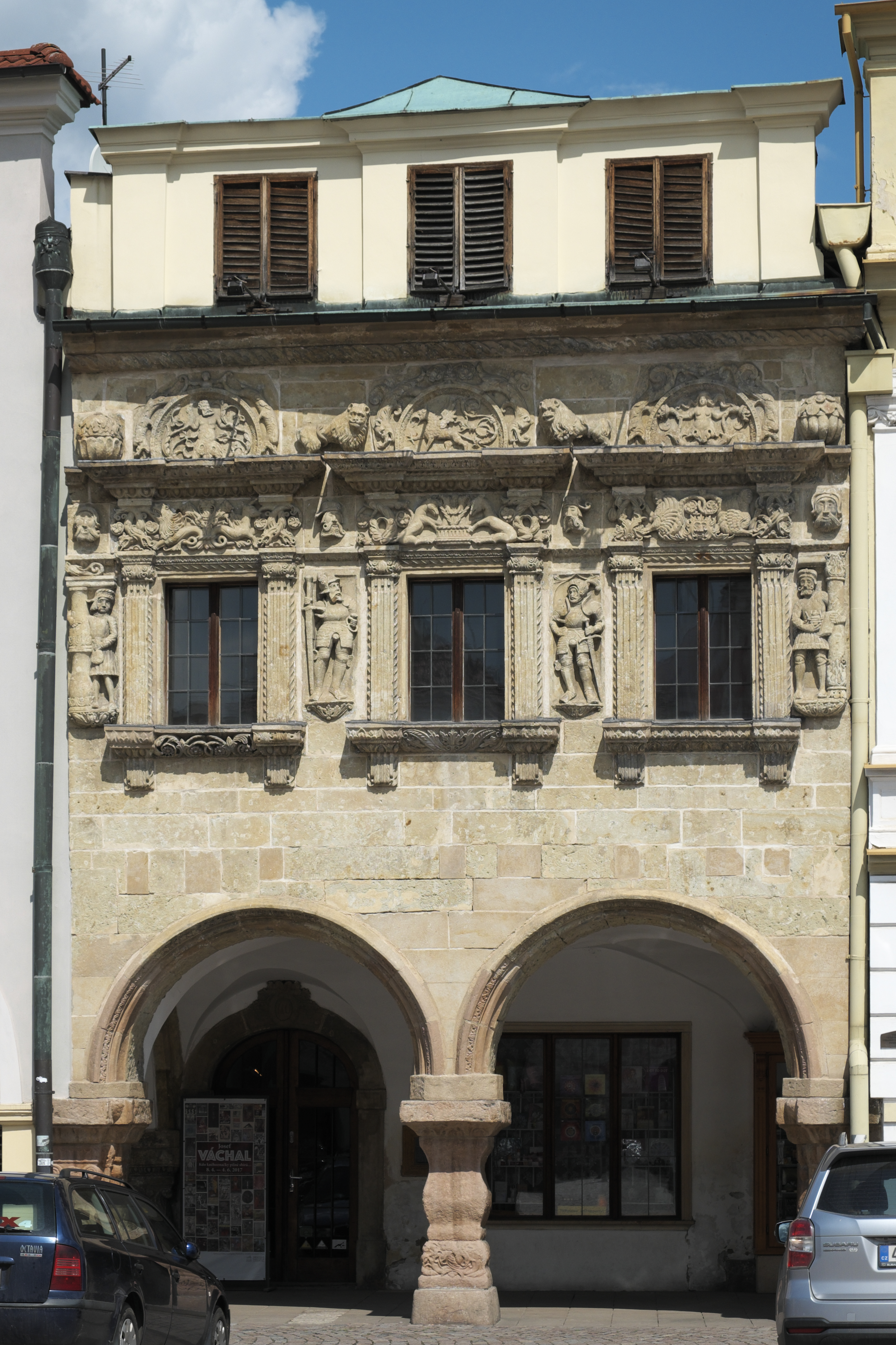 Dům U Rytířů, Smetanovo náměstí 110, in Litomyšl im Okres Svitavy in der Pardubitzer Region in Tschechien, Gebäude mit Renaissancefassade